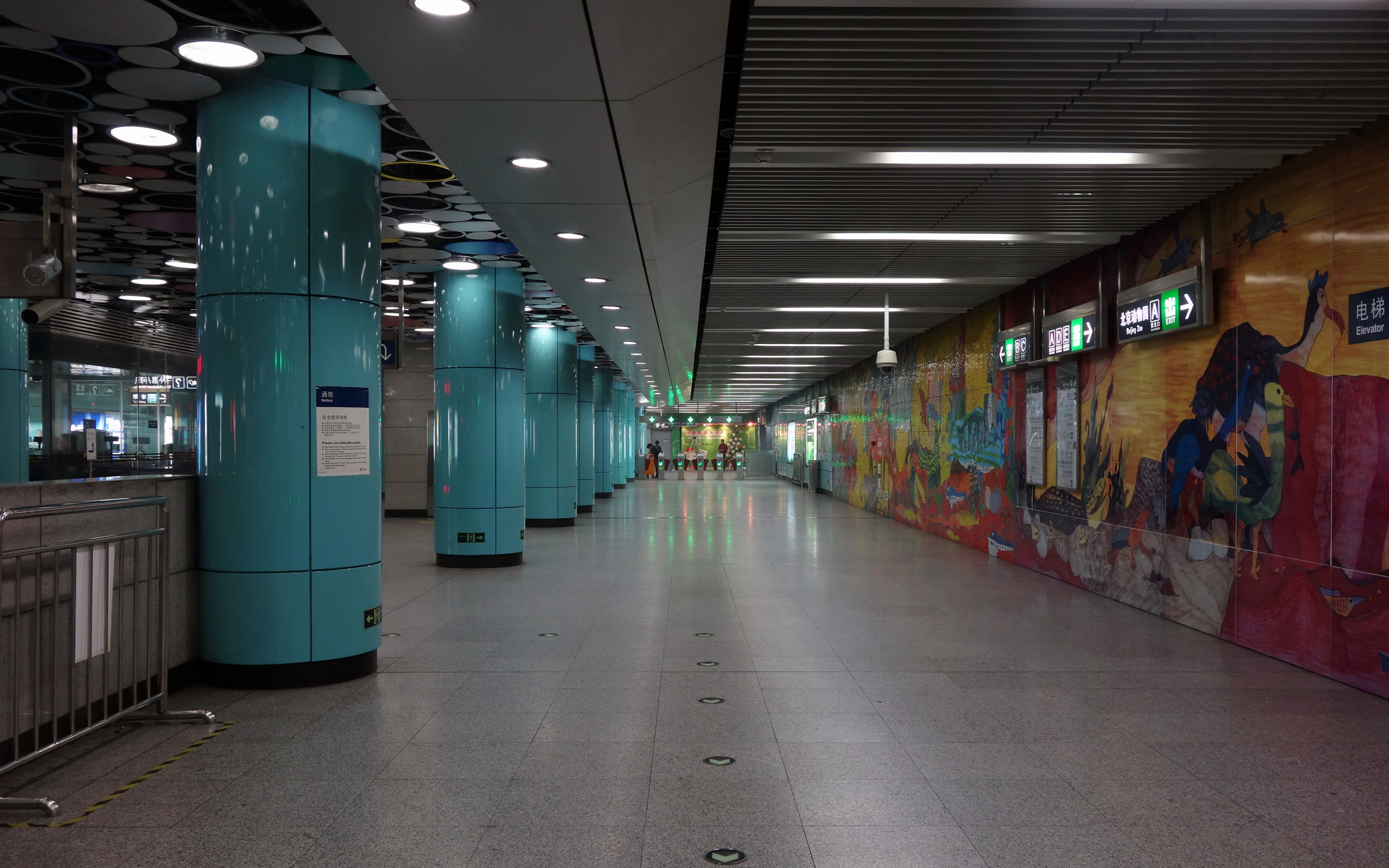 北京地铁4号线动物园站的站厅